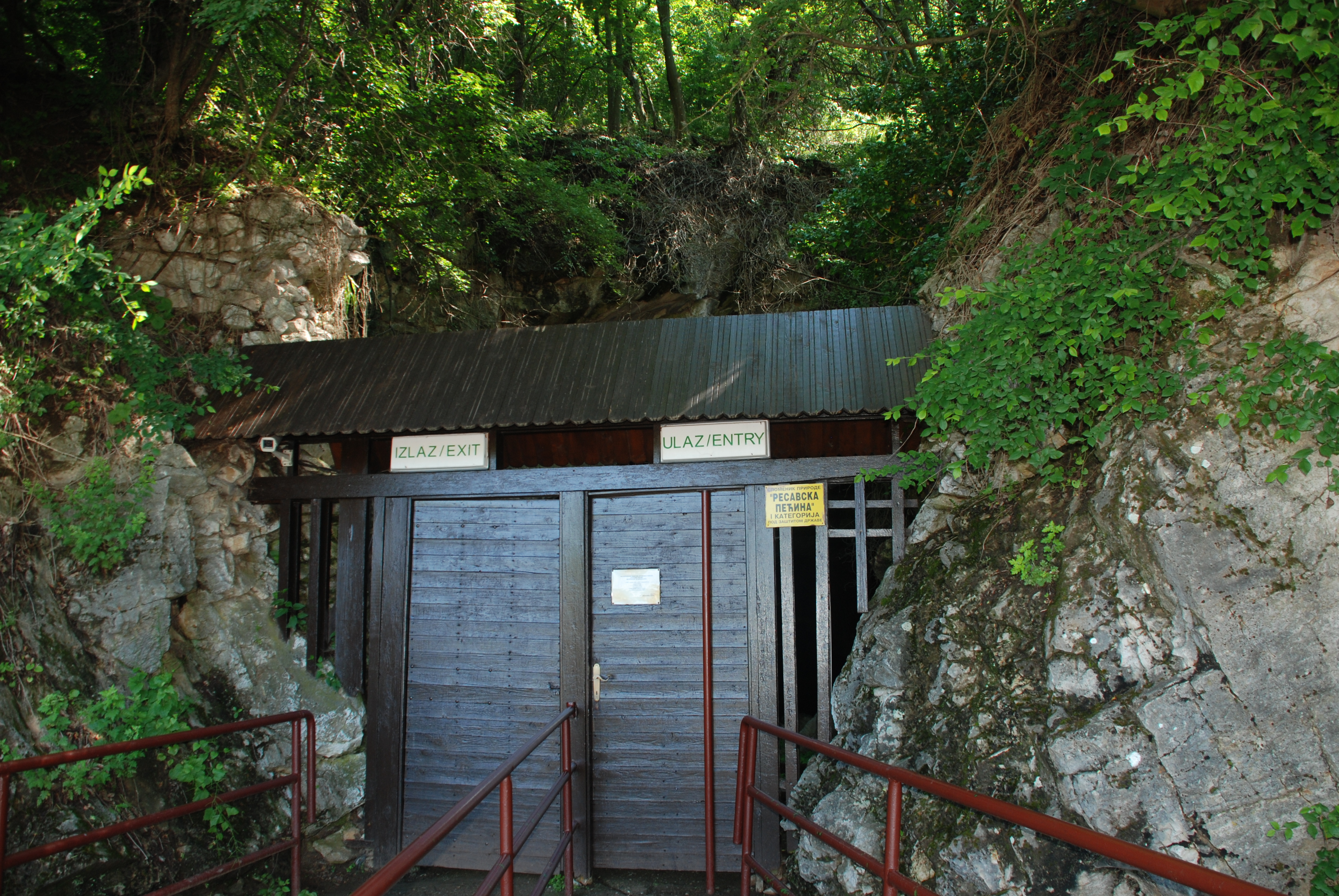 Српски (ћирилица): Ово је фотографија заштићеног природног добра у Србији под шифром: СП164 This is a a photo of a natural area in Serbia with ID: СП164